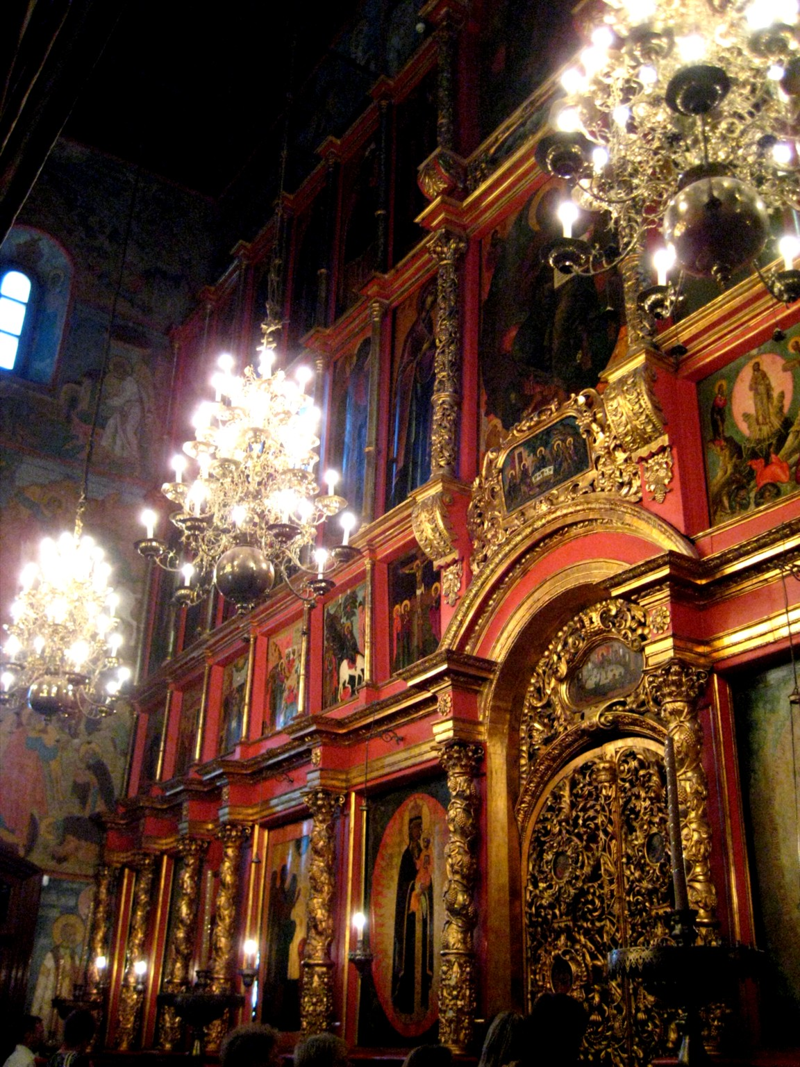 Иконостас Архангельского собора